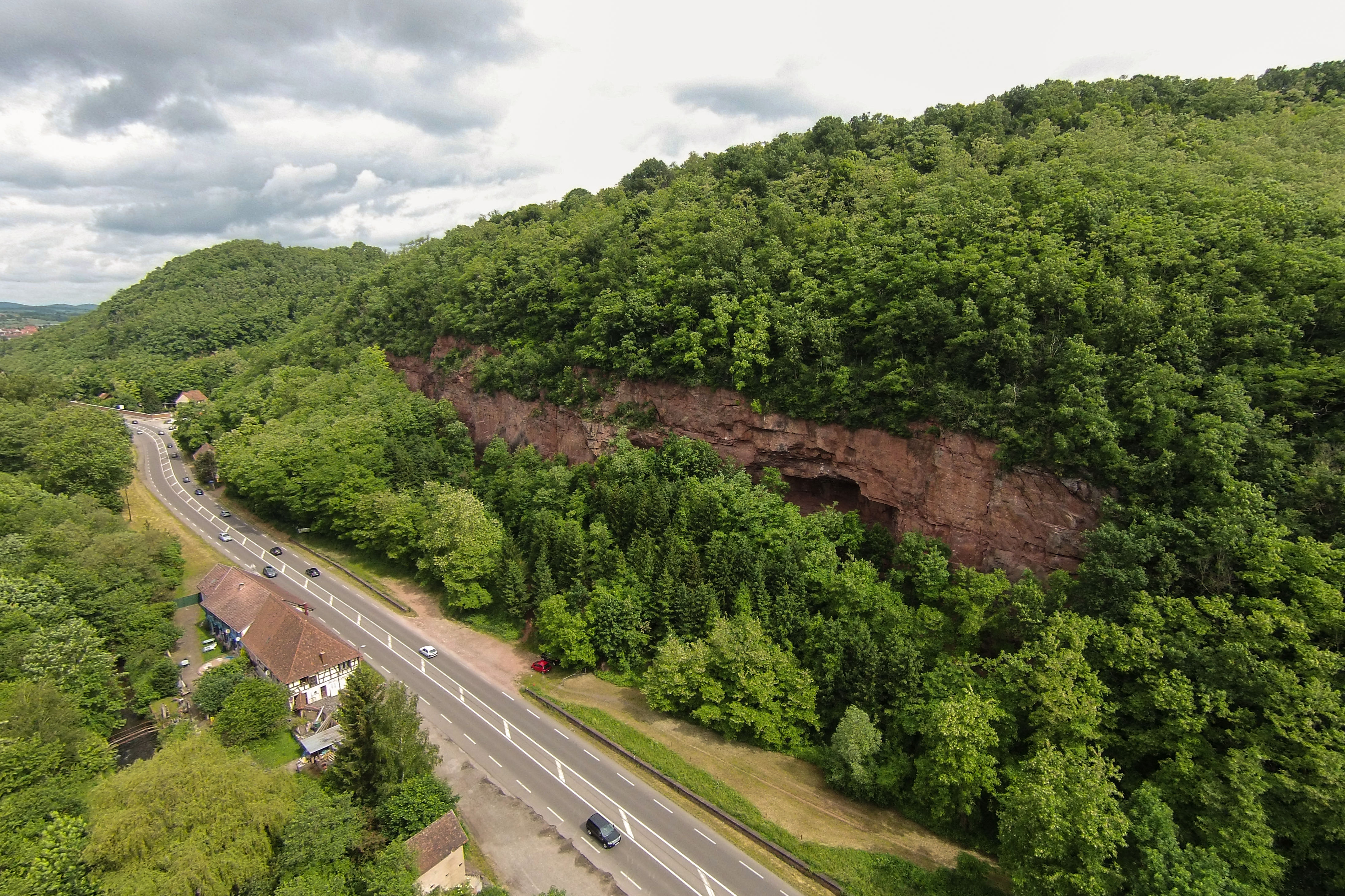 Photo prise avec mon drone Phantom DJI